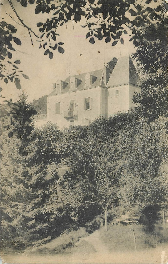 Château des Terrasses circa 1900